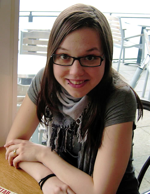 DE / EN: Stefanie Heinzmann in Hamburg